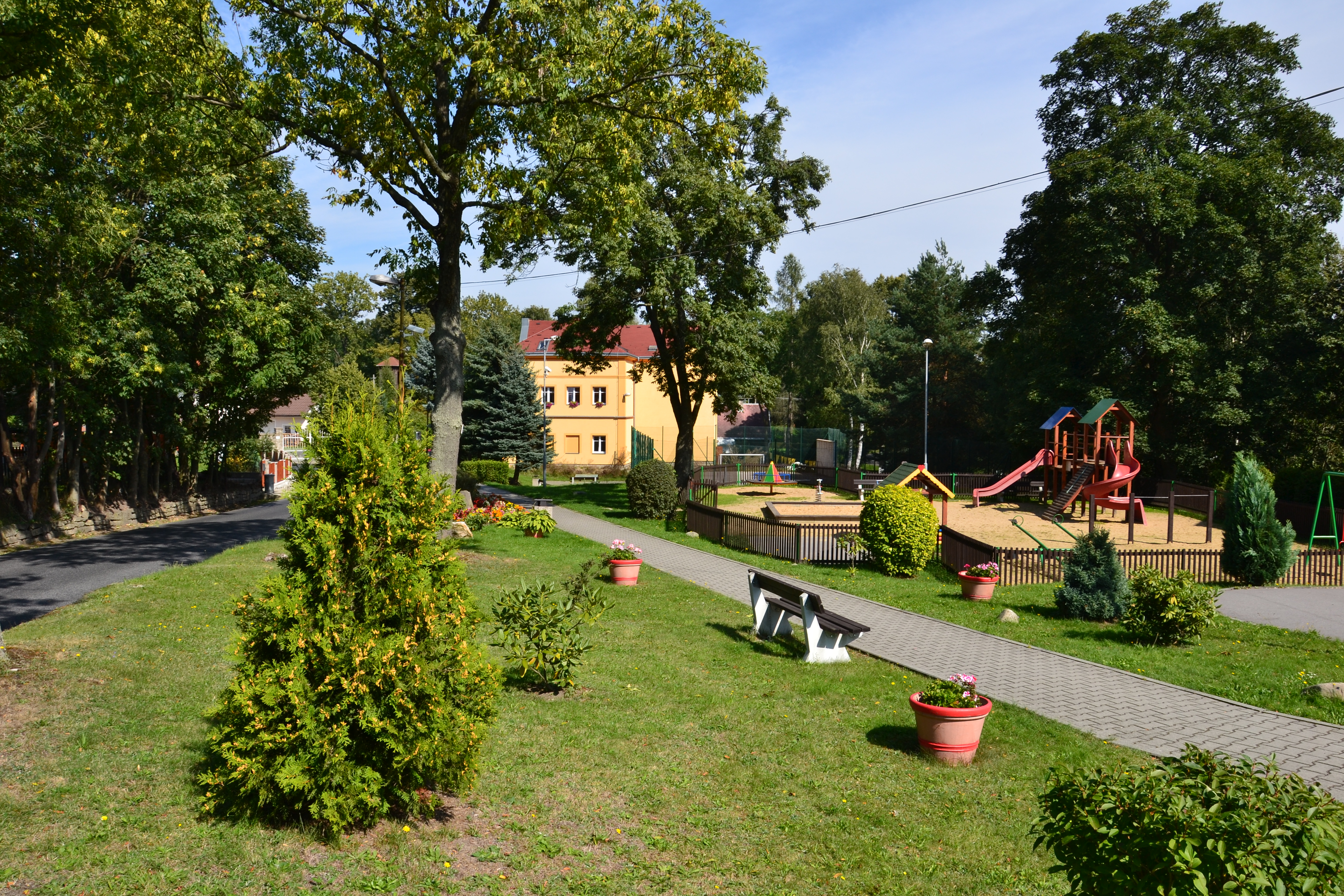 Náves